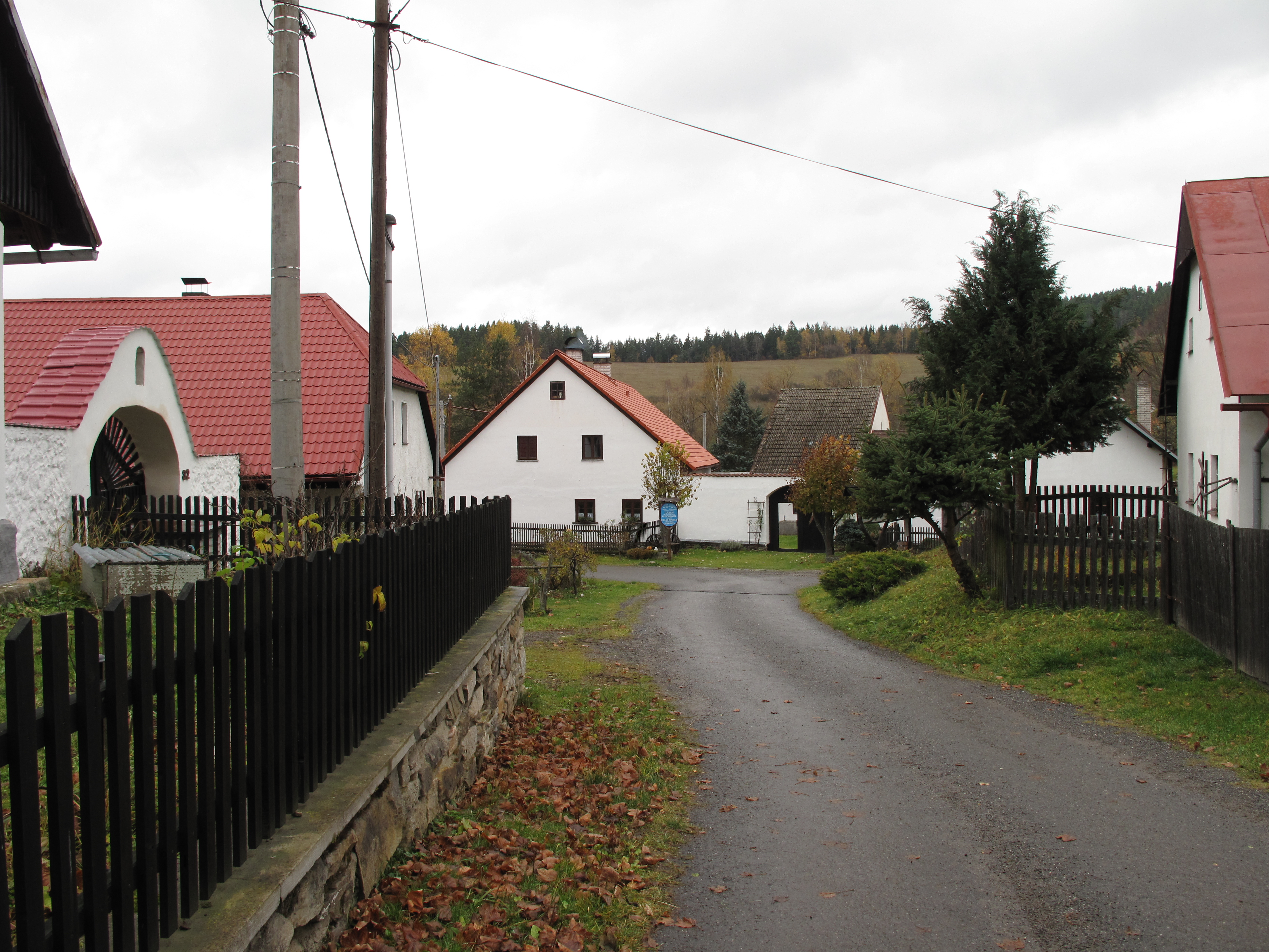 Dolní Dvorce (Kašperské Hory). Okres Klatovy, Česká republika.